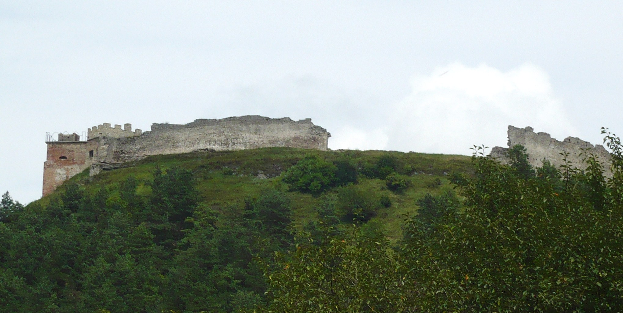 Zamek w Krzemieńcu